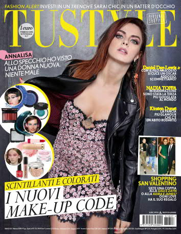 Copertina della rivista Tustyle 7 febbraio 2018, Arnoldo Mondadori Editore. La foto ritrae la cantante Annalisa Scarrone.